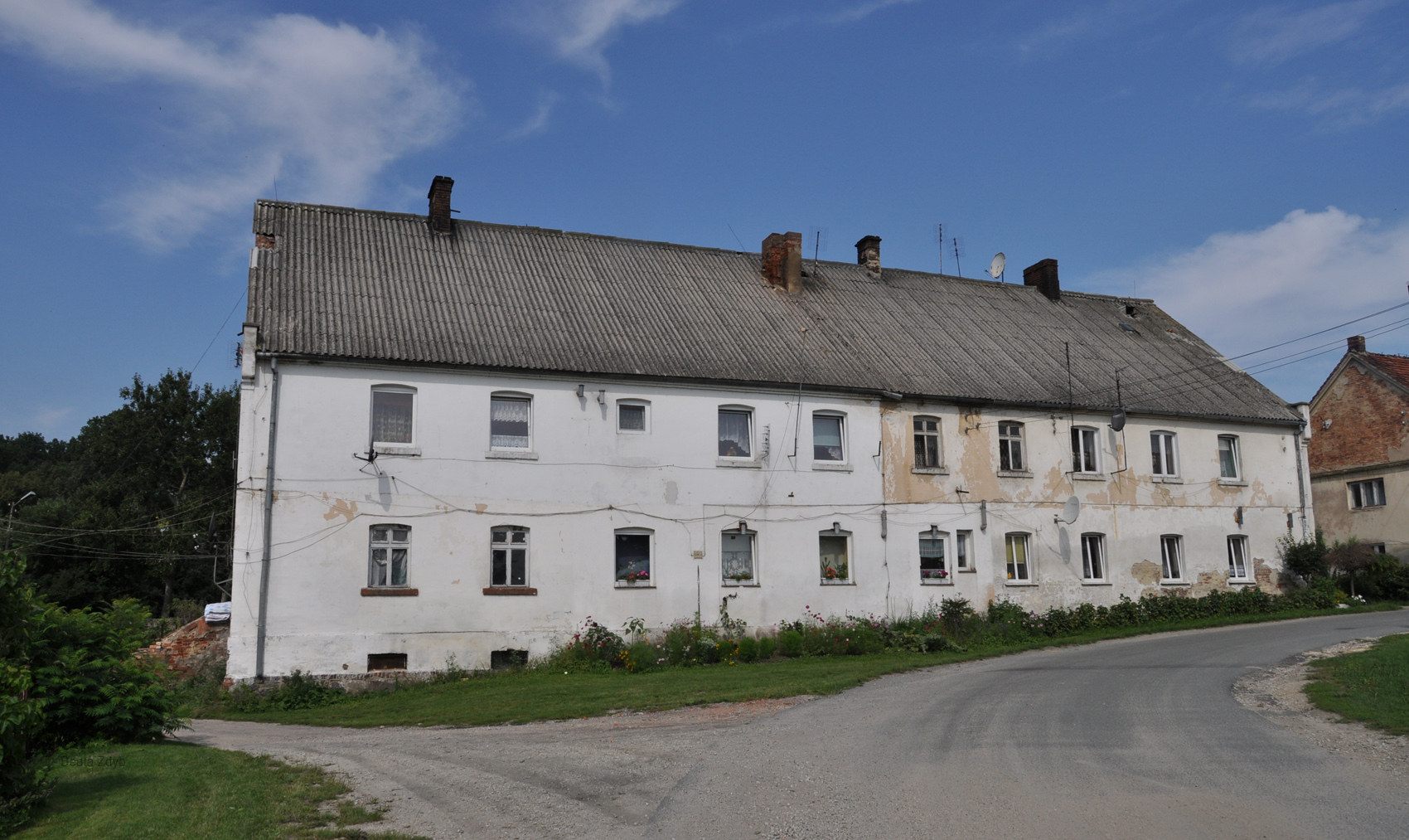 Ogrodnica - budynek